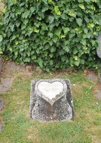 Grab Helli Servi-Grinzinger Friedhof